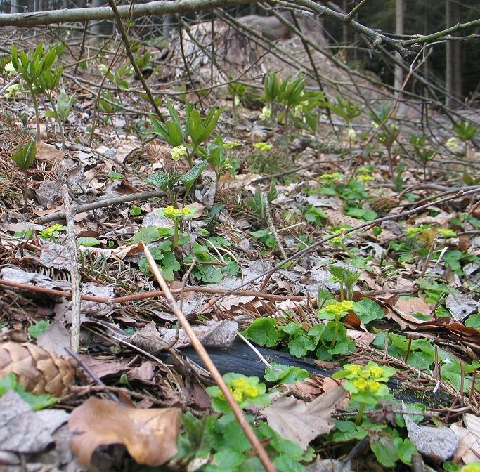 Zahnwurz und Milzkraut (Chrysosplenium) – Feuchte zeigende Pflanzen auf einer Rodungsfläche für den Straßenbau im Bayerischen Wald